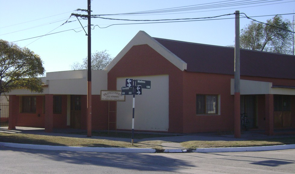 Biblioteca José Hernández